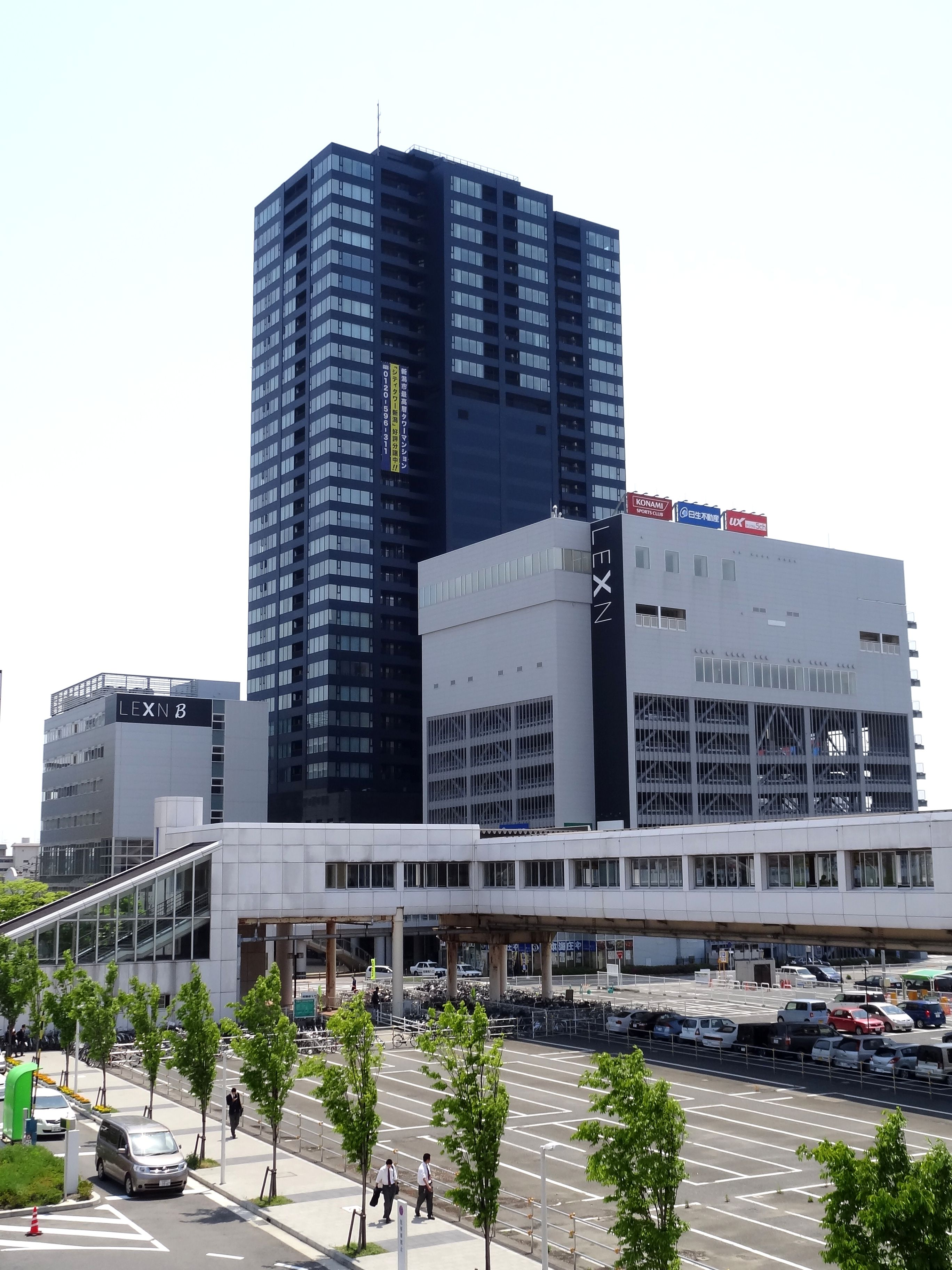 レクスン外観